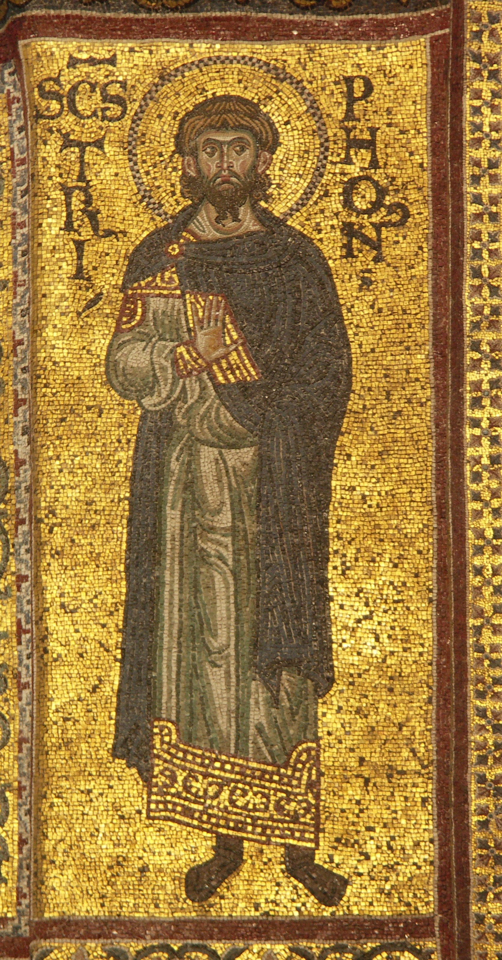 Der heilige Tryphon, Mosaik im Dom von Monreale